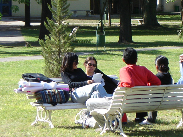 Campus de la Universidad